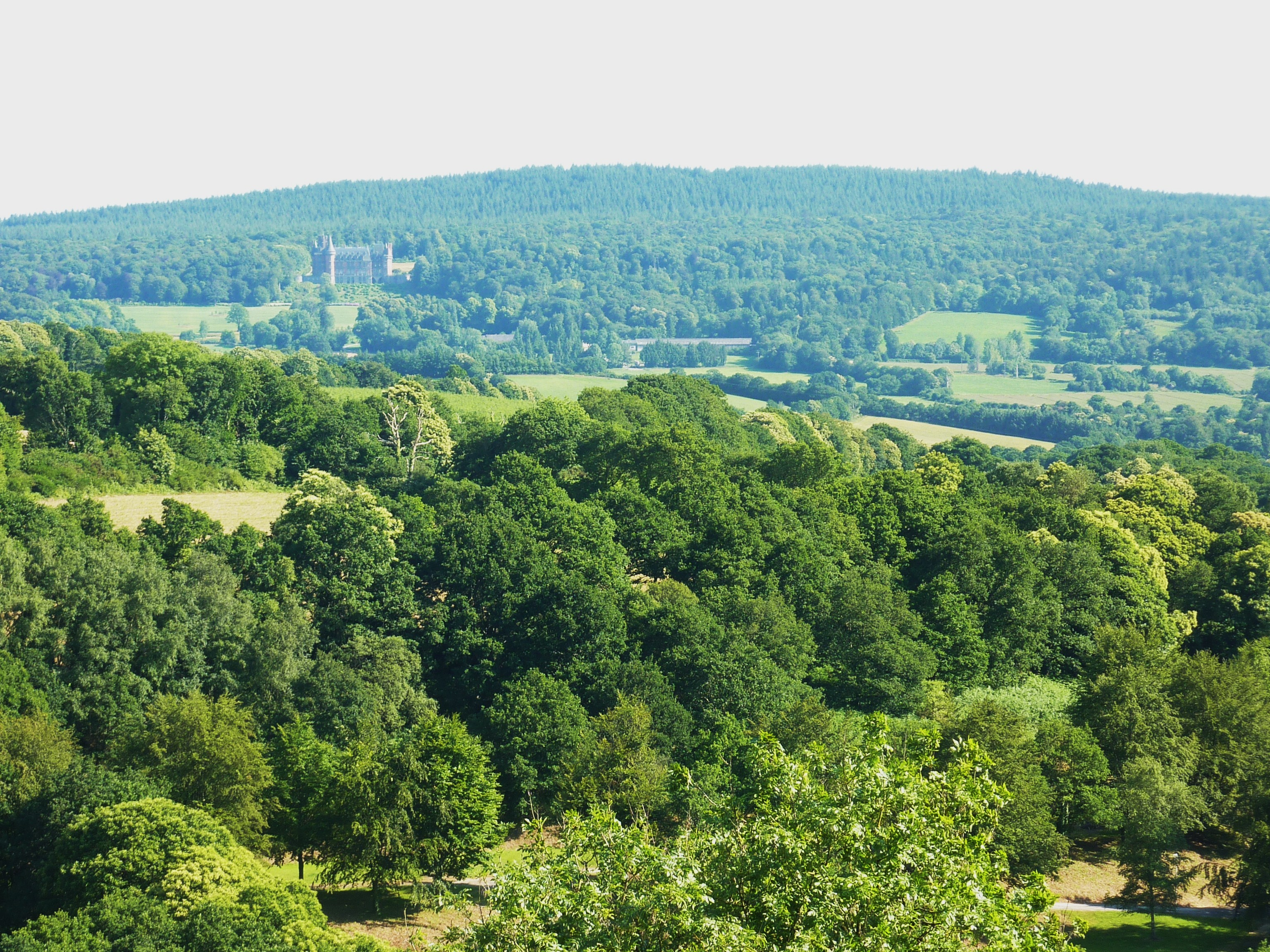 Châteauneuf-du-Faou : Montagnes Noires et Château de Trévarez depuis le point de vue de Châteauneuf-du-Faou dominant l'Aulne